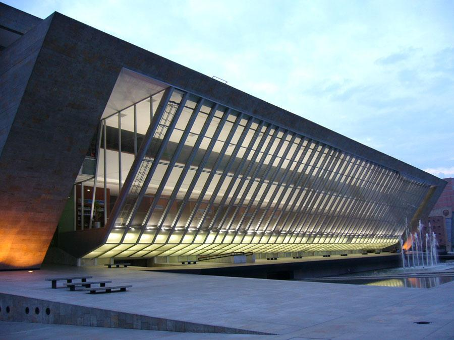 Biblioteca Temática EPM, Plaza de Cisneros, Medellín (Colombia)